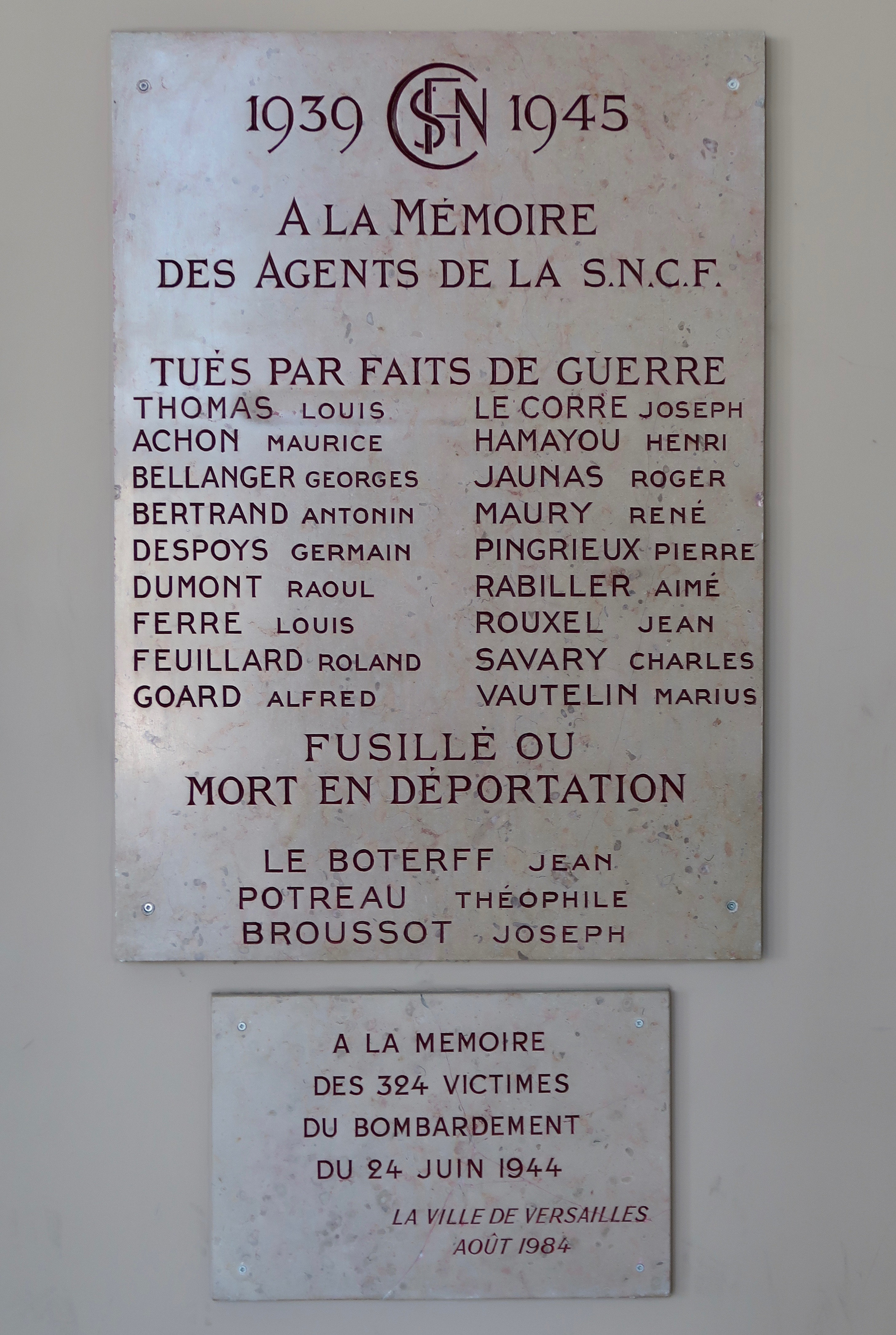 Plaques en hommage aux agents de la SNCF morts durant la Seconde Guerre mondiale, gare Versailles-Chantiers (Yvelines).